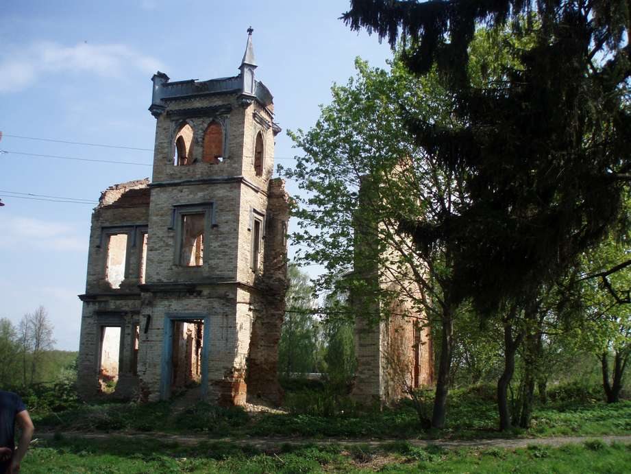 Господский дом (Калужская область, Сухиничи, д. Наумово)